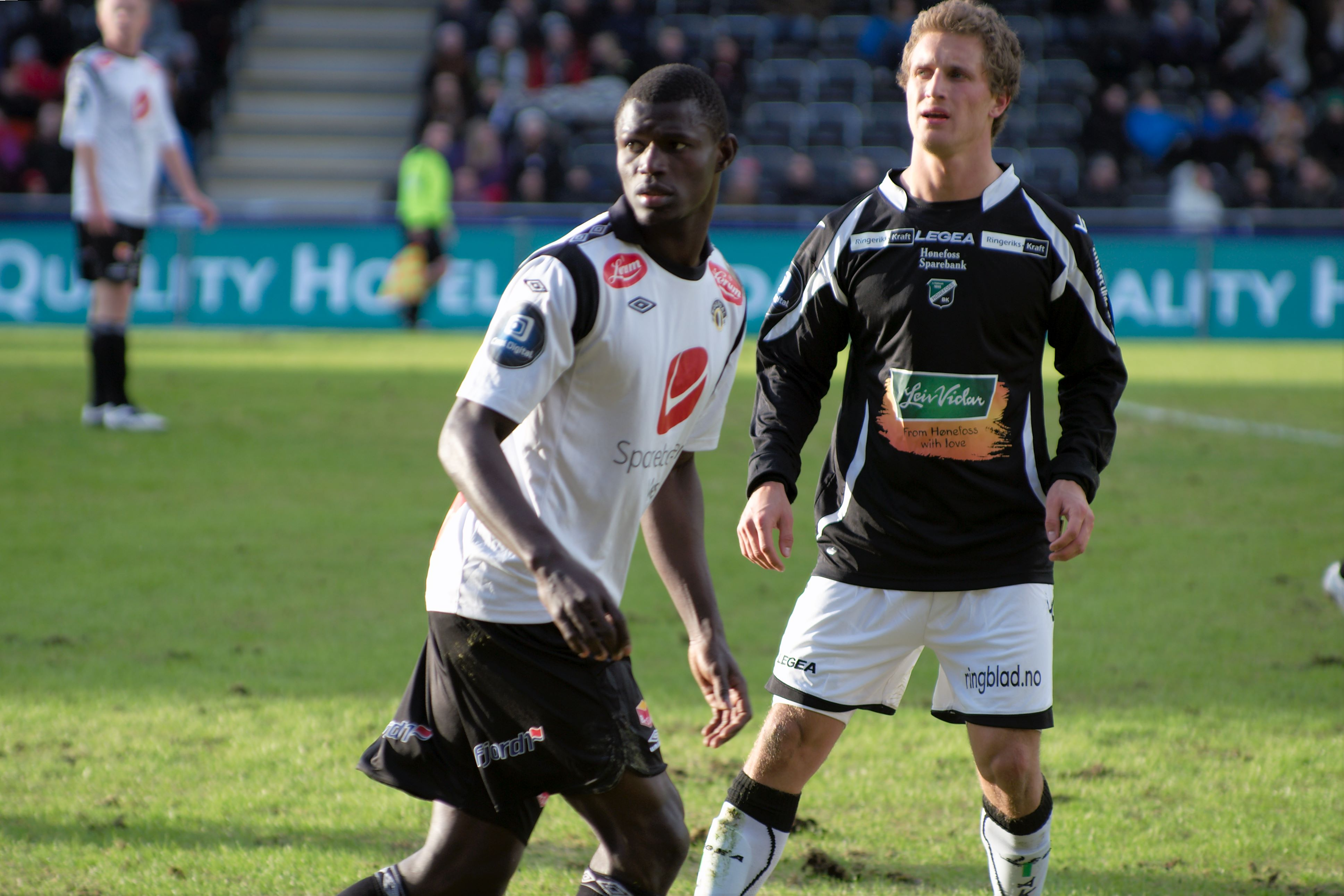 Stéphane Diarra Badji and Kenneth Di Vita Jensen.